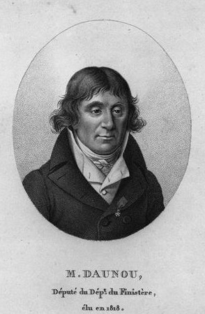 Pierre Claude François Daunou (1761-1840), french historian and politician